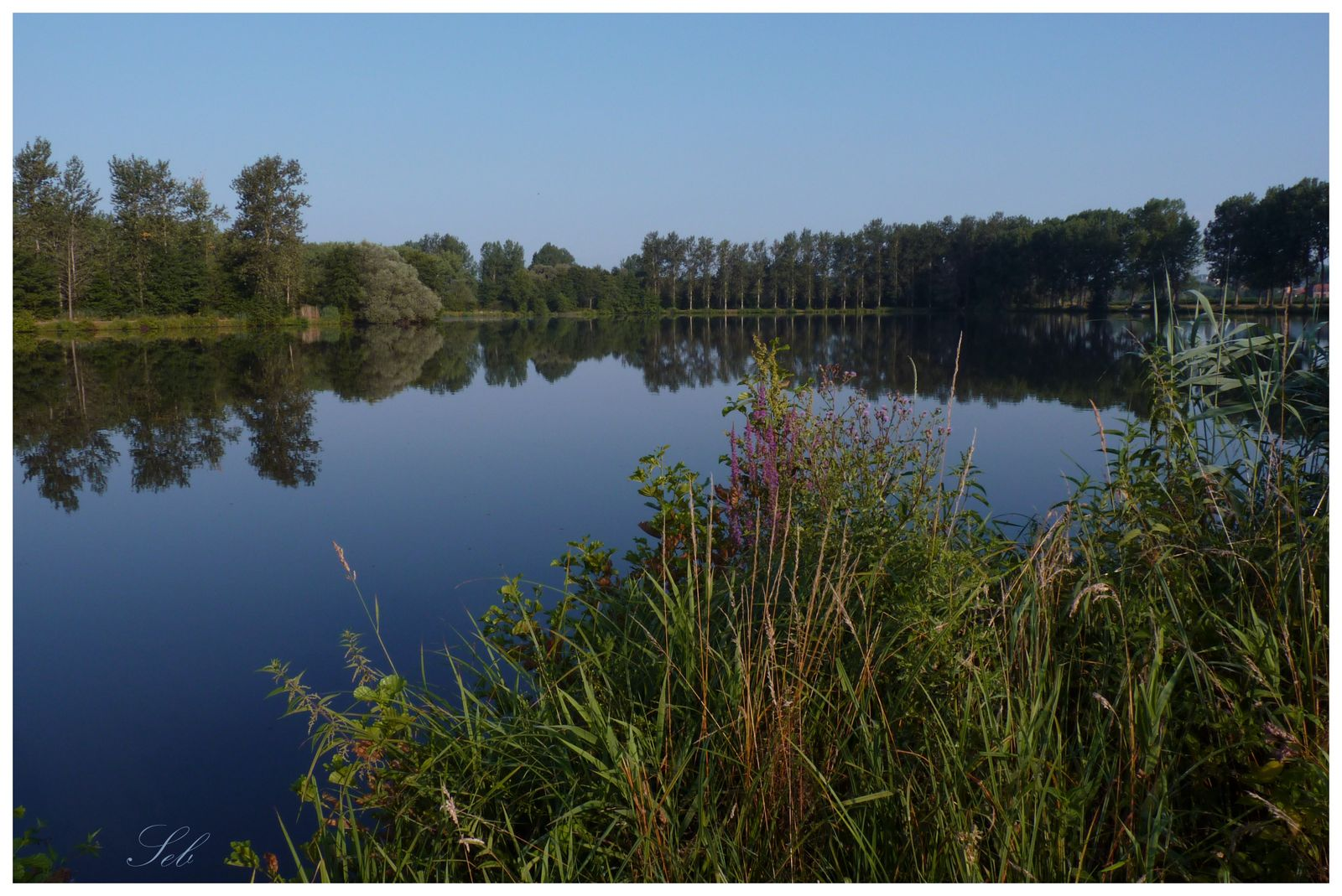 Les étangs Thirier